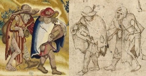 Comparaison de détails entre la tapisserie de Saint Martin et les mendiants (à gauche) et le dessin des Mendiants de l'Albertina (à droite).